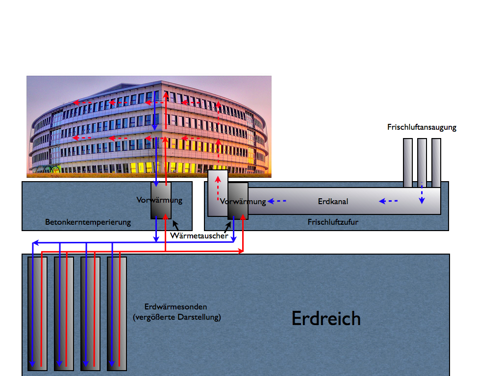 Schematische Darstellung der Funktionsweise von Zuluftvorerwärmung und Betonkerntemperierung mit der Hilfe der Erdwärmesonden